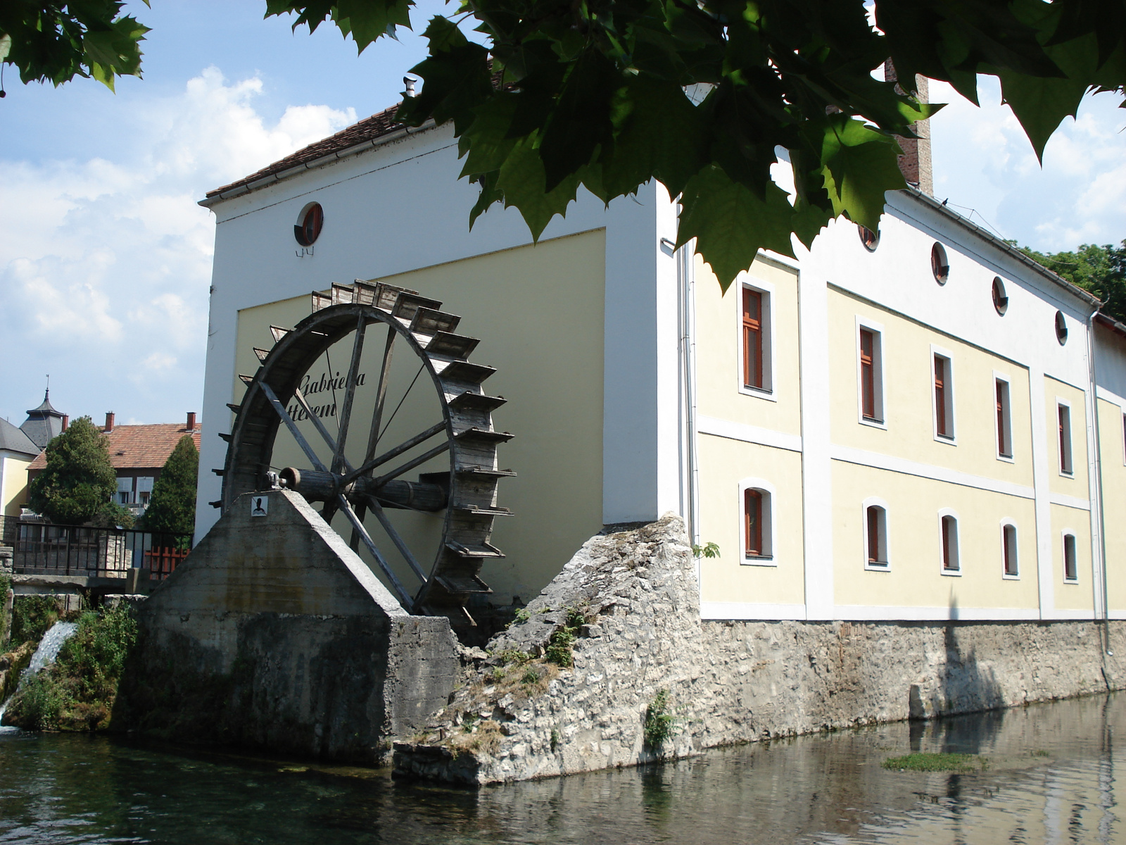 Gabriella szálloda. Az épület jó állapotú, jelenleg étterem és szálloda, korábban 1966-tól Gabriella-turistaszálló volt. Egy 13.századi vízimalom épületéből kialakított szálloda a város szülöttének, Batsányi János feleségének (Gabriella Baumberg) nevét kapta. Műemléki azonosító: -3282. - Veszprém megye, Tapolca, Batsányi tér 7. This is a photo of a monument in Hungary. Identifier: -3282